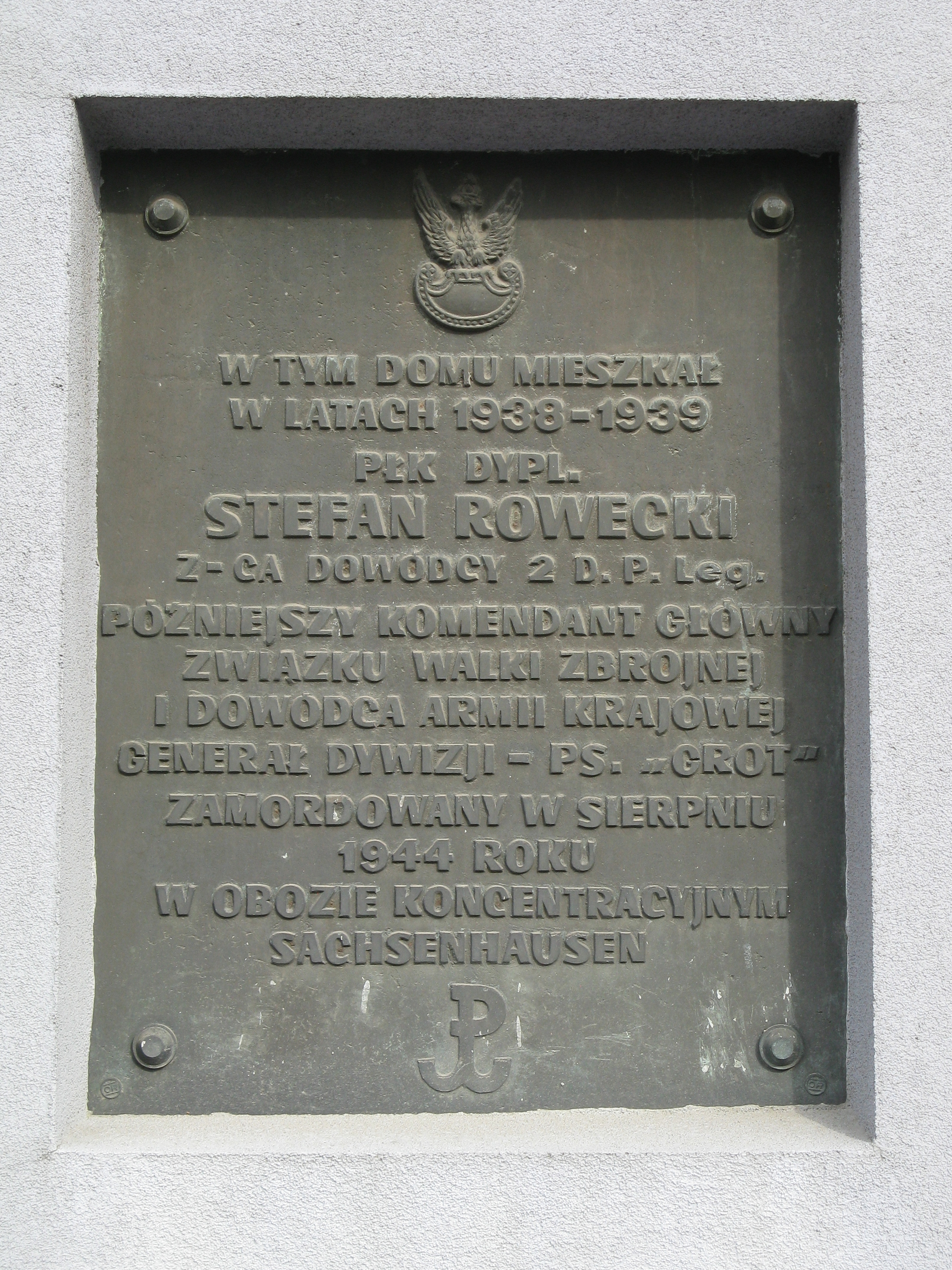 Tablica poświęcona S. Grotowi Roweckiemu w Kielcach, ul. Żelazna 33, Kielce.